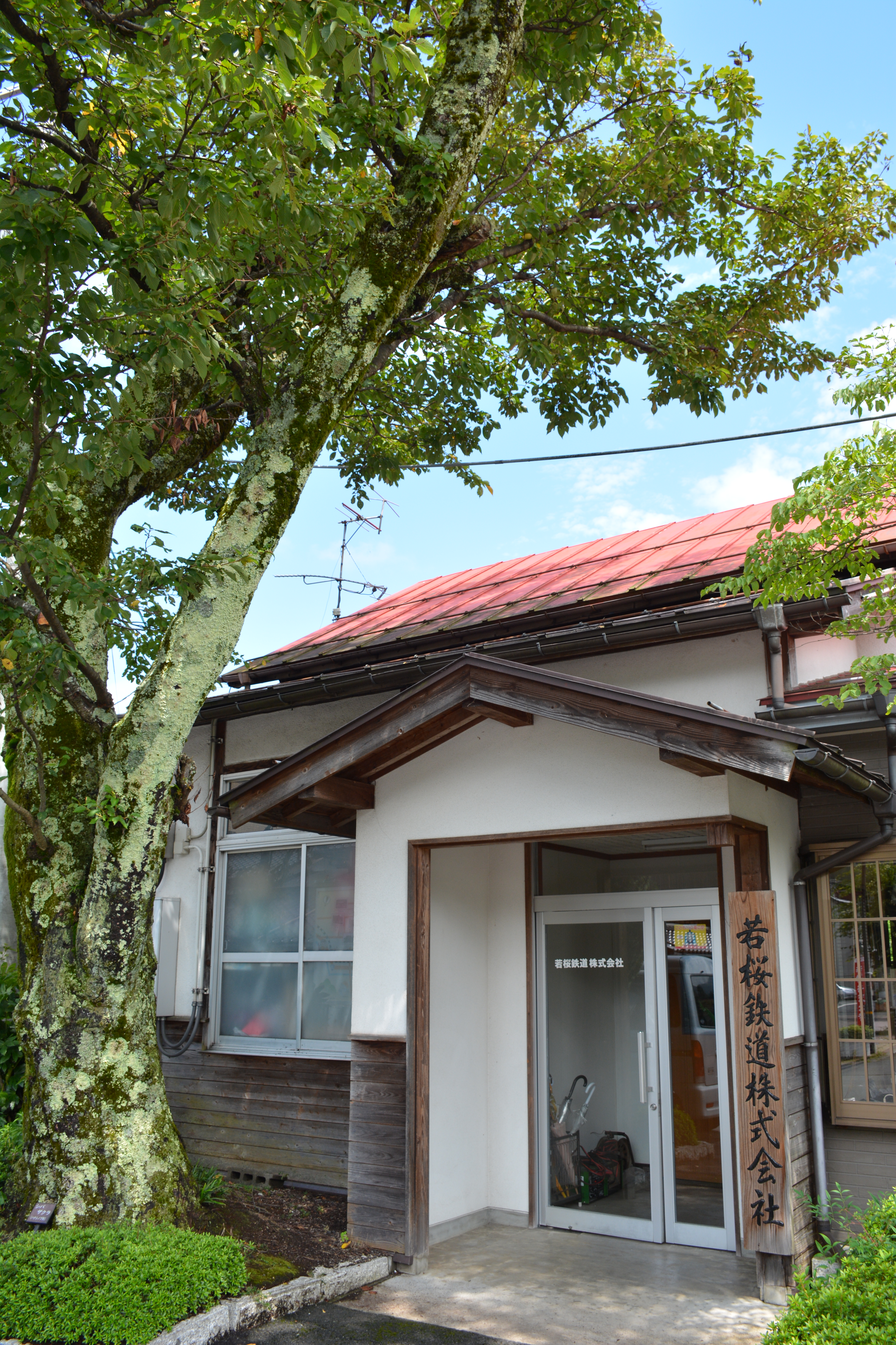 若櫻鐵道總部，位於若櫻鐵道若櫻線若櫻站。